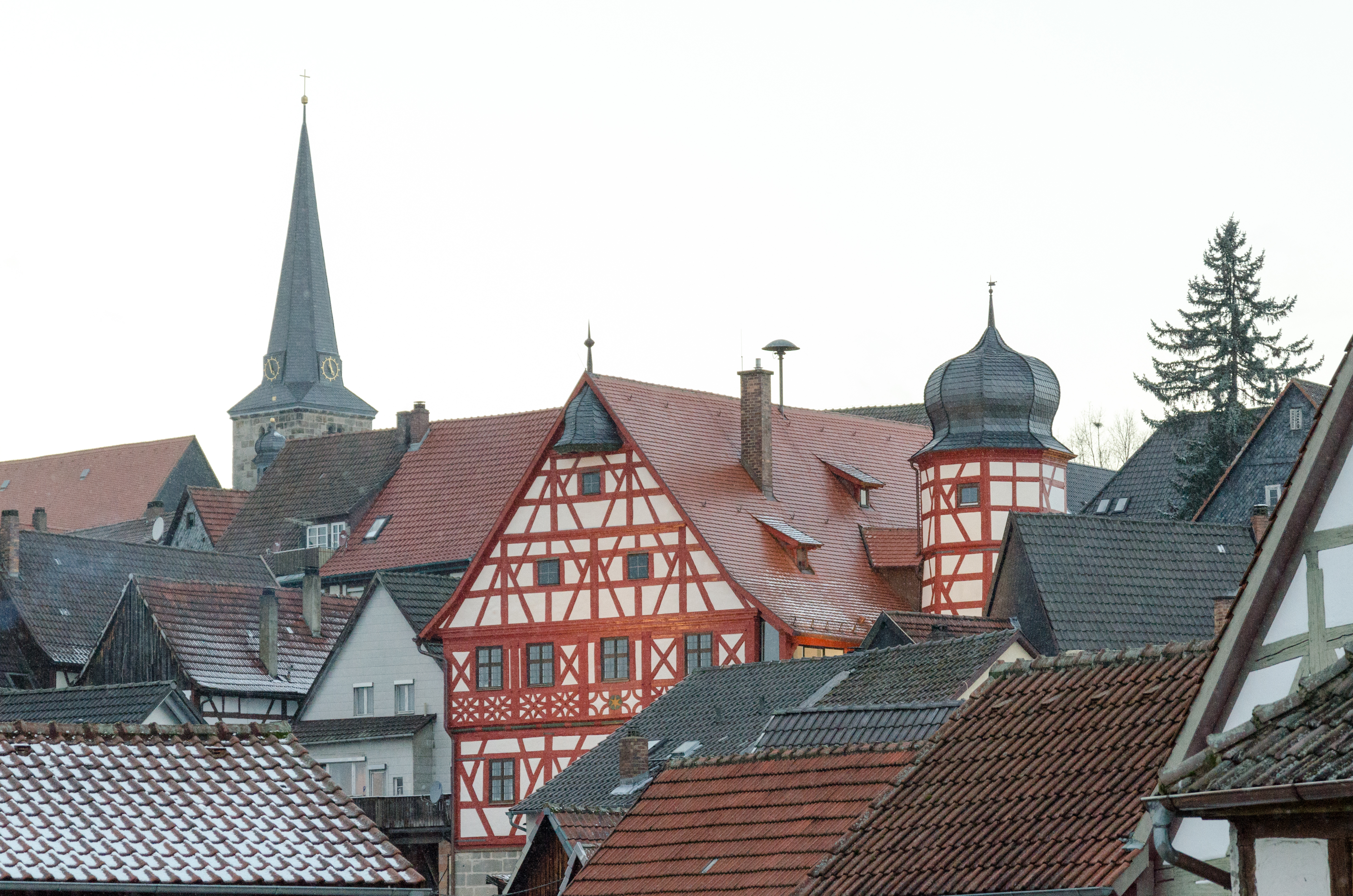 Marktzeuln, von Süden